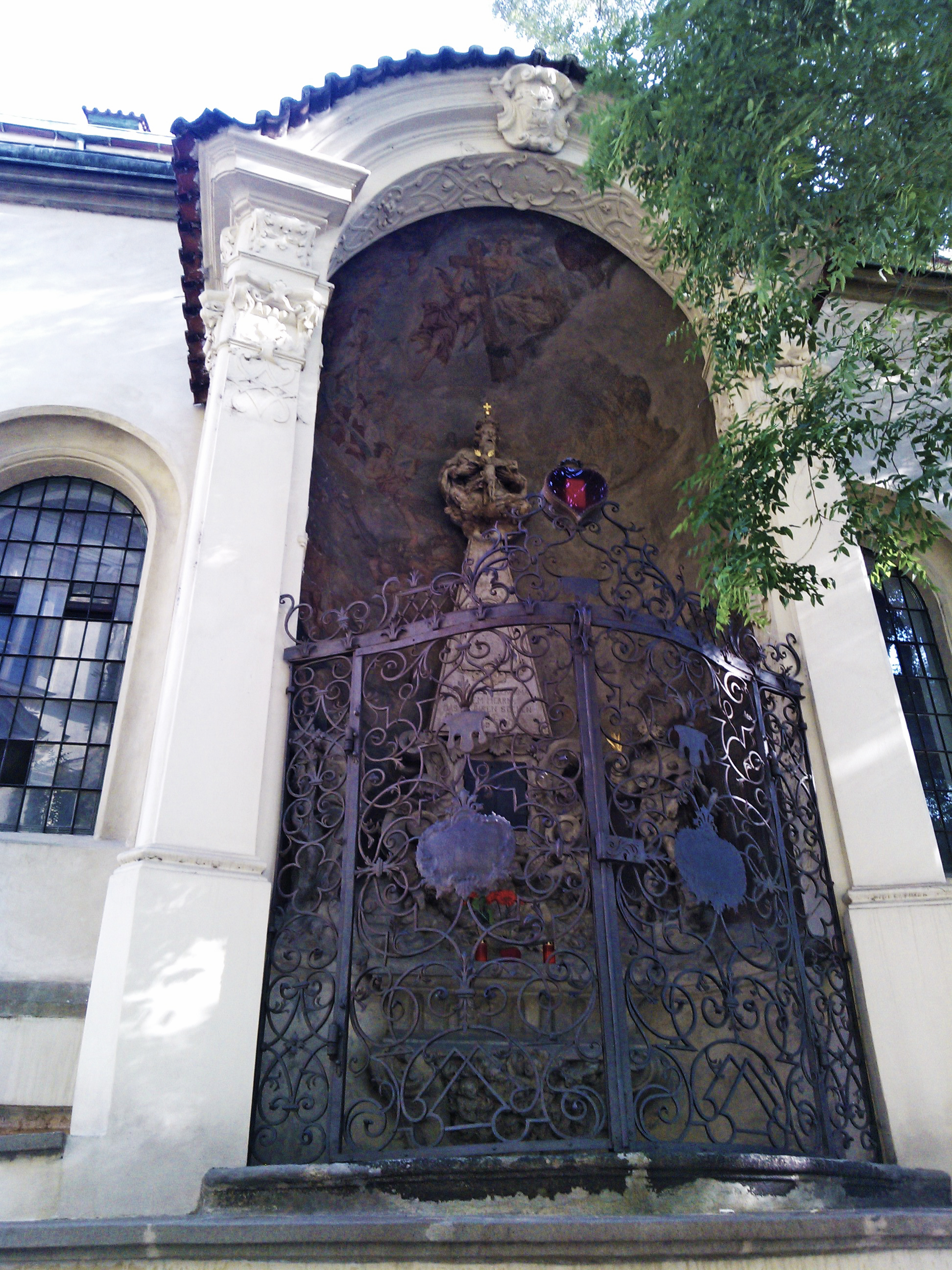 Kaple Branbergerů, Kostel svatého Štěpána, Praha Nové Město